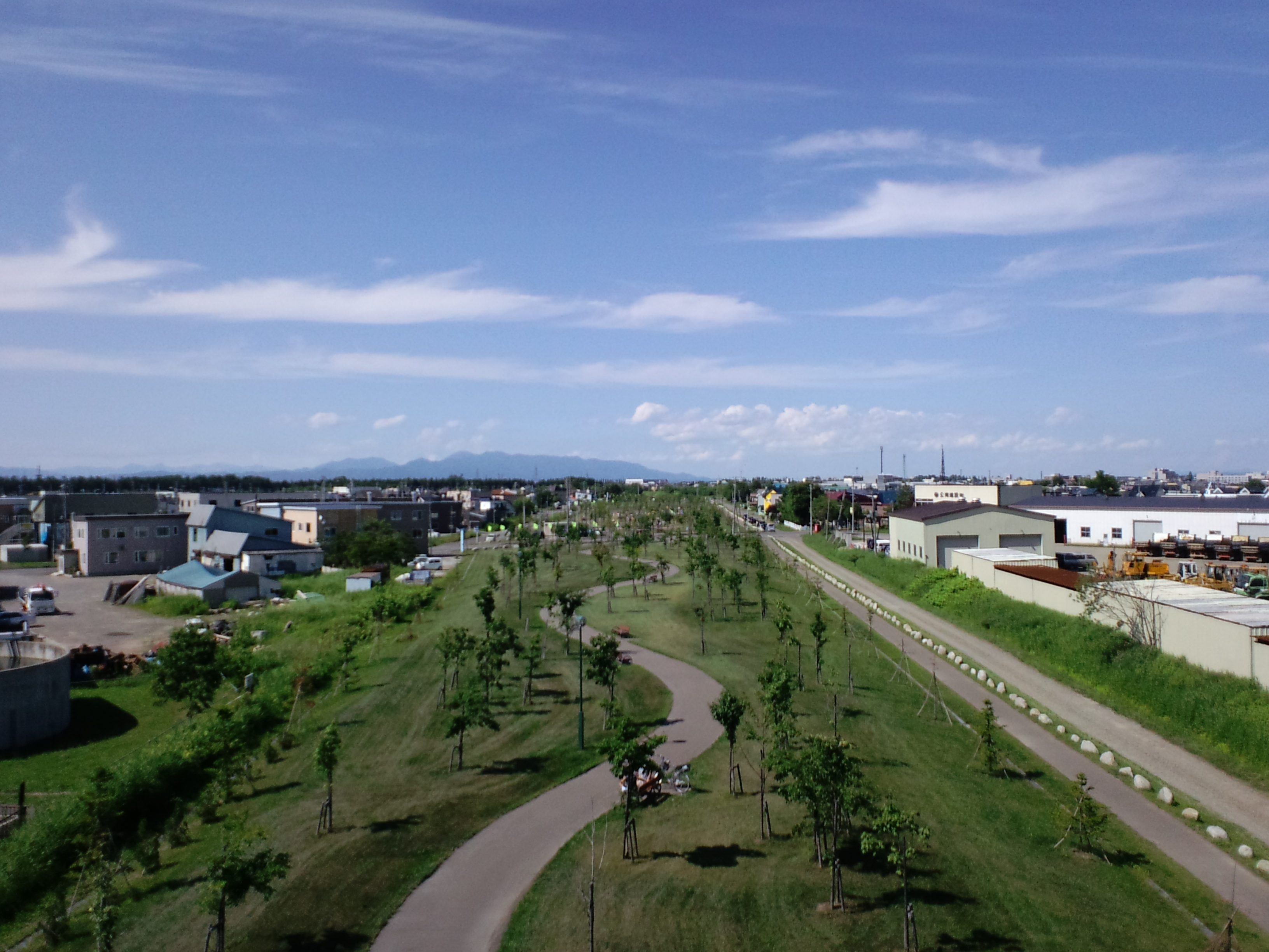 室蘭本線跡地緑地・全景